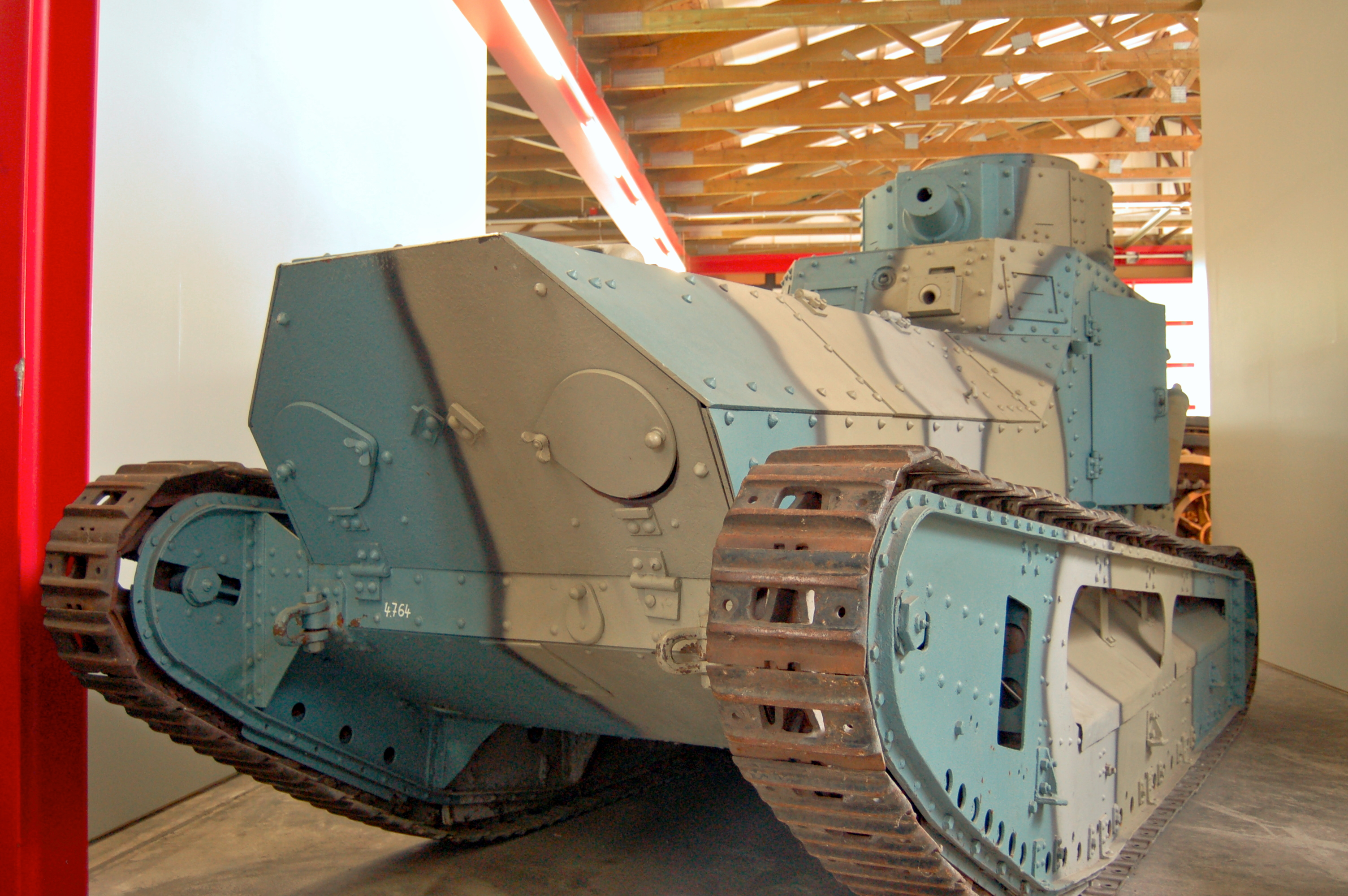 Leichter Kampfwagen "LK II" Kanonen-Modell (Prototypen-Version) Besatzung: 3 Soldaten Gewicht: 8,5 Tonnen Bewaffnung: 1 x 3,7 cm Krupp-Kampfwagenkanone Baujahr: 1918 Stückzahl: 10 Sonstiges: Die Kampfwagen wurden 1921 nach Schweden verkauft und kam unter dem Namen Stridsvagn m 21 beim Schwedischen Heer zum Einsatz.